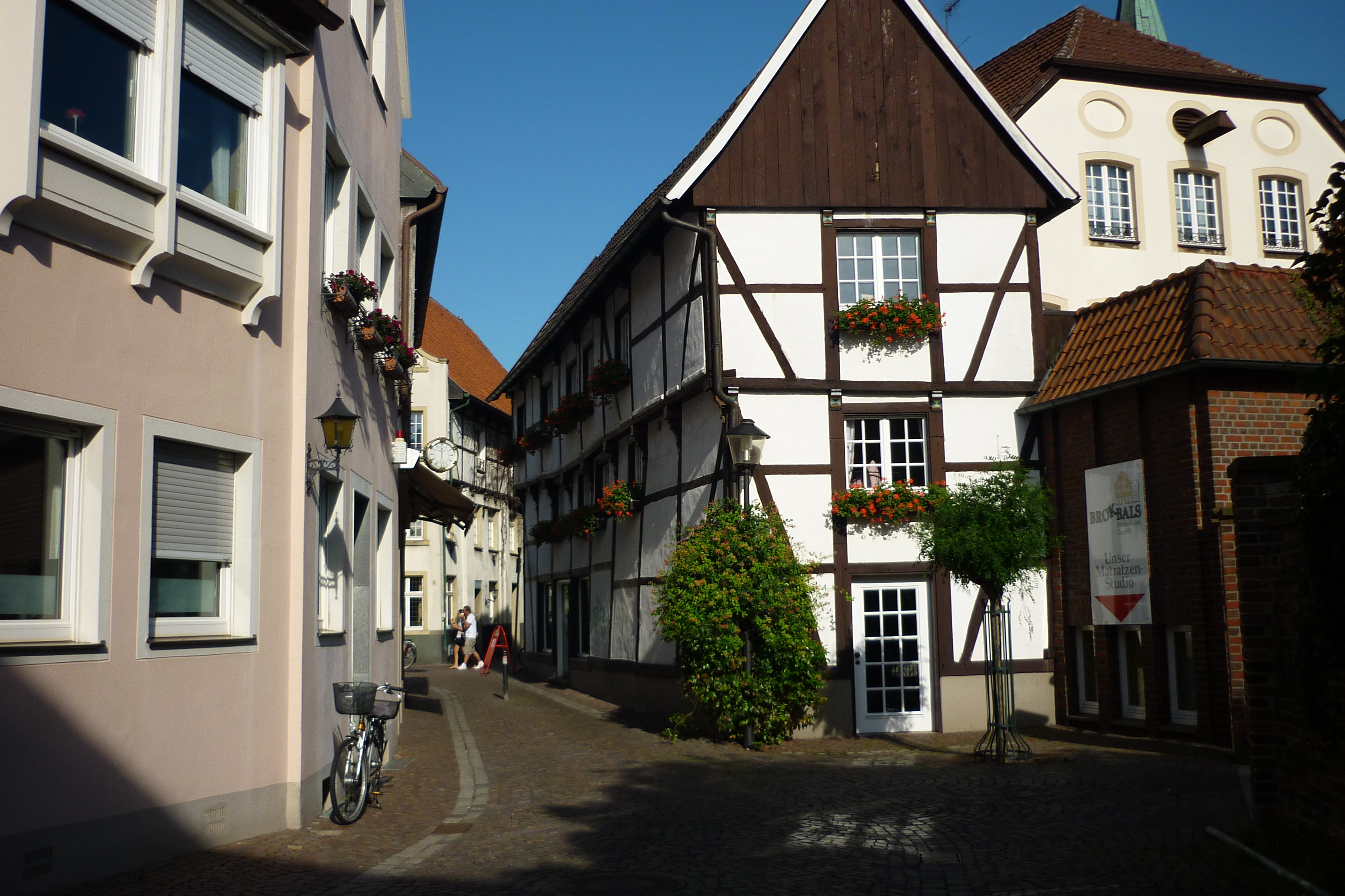 Warendorf. Die Straße Kanonenburg in der historischen Altstadt nahe dem Markt.